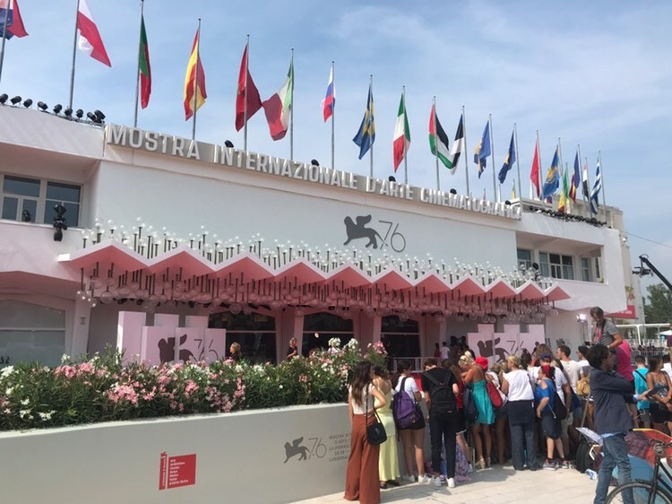 Festival di Venezia 2019